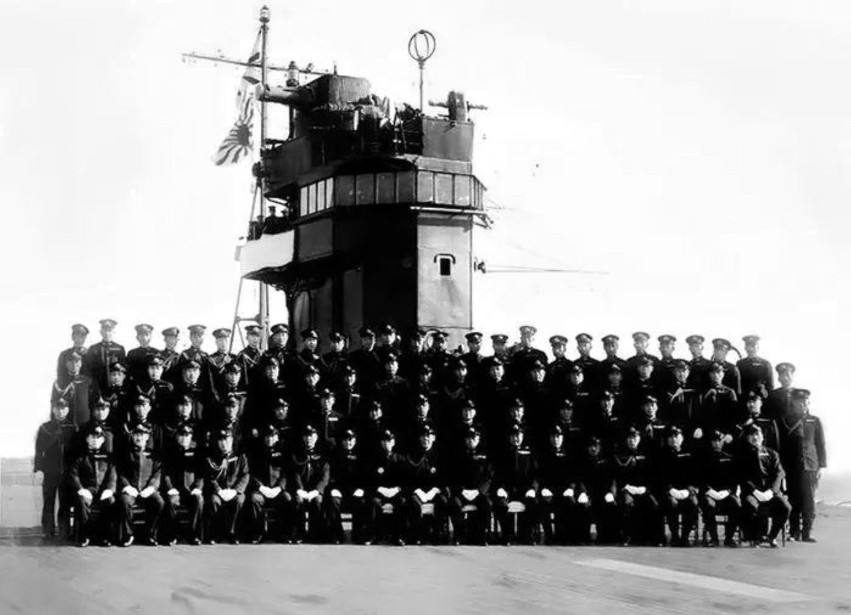 真珠湾攻撃後、日本に寄港した時に赤城艦上で撮られた集合写真（永野修身海軍軍令部総長、山本五十六聯合艦隊司令長官などの姿が見られる）